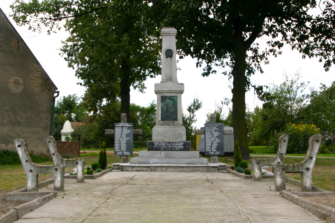 Błażejowice Dolne (dodatkowa nazwa w j. niem. Blaschewitz) – wieś w Polsce położona w województwie opolskim, w powiecie prudnickim, w gminie Głogówek.